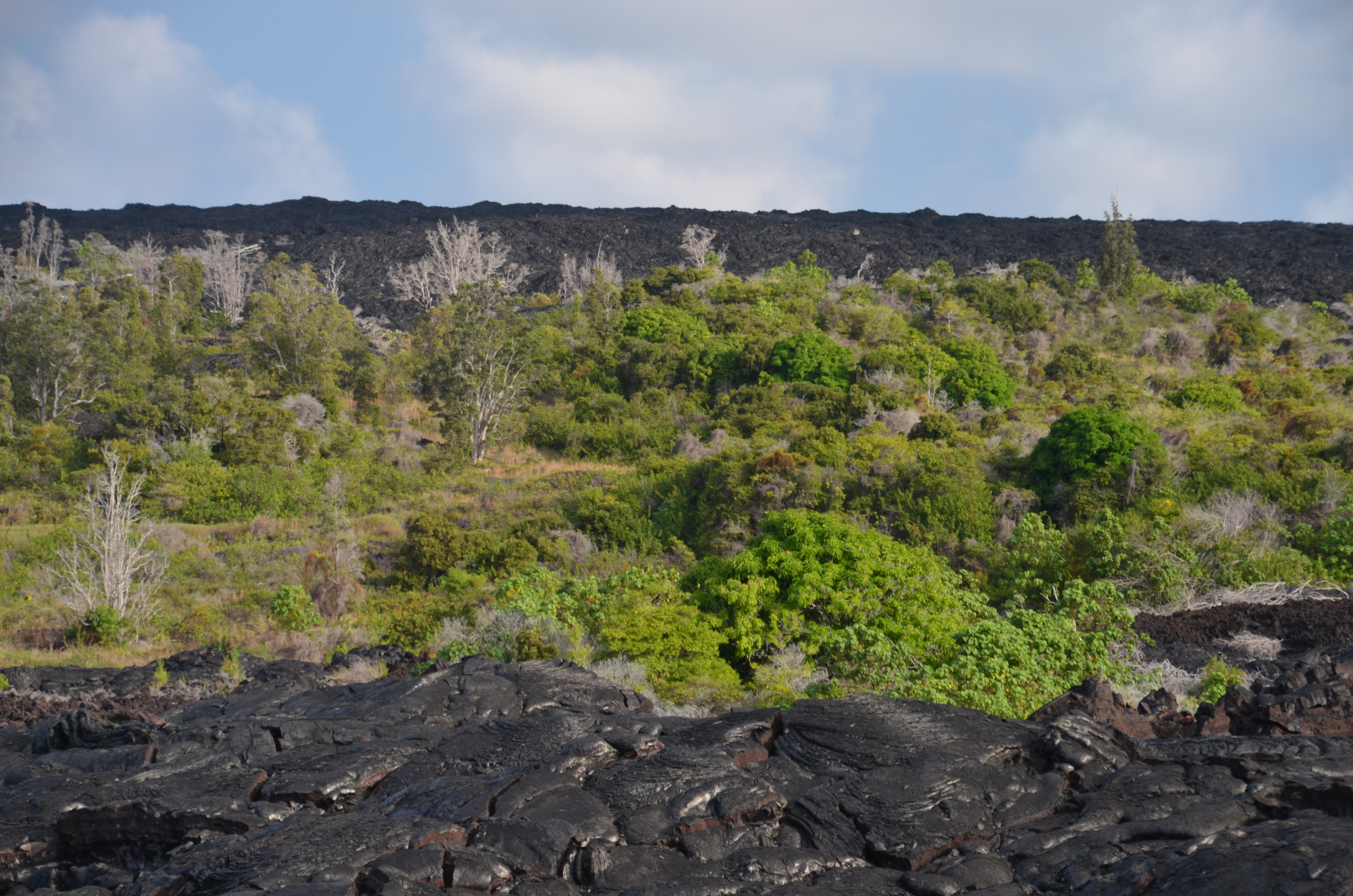 Kipuka